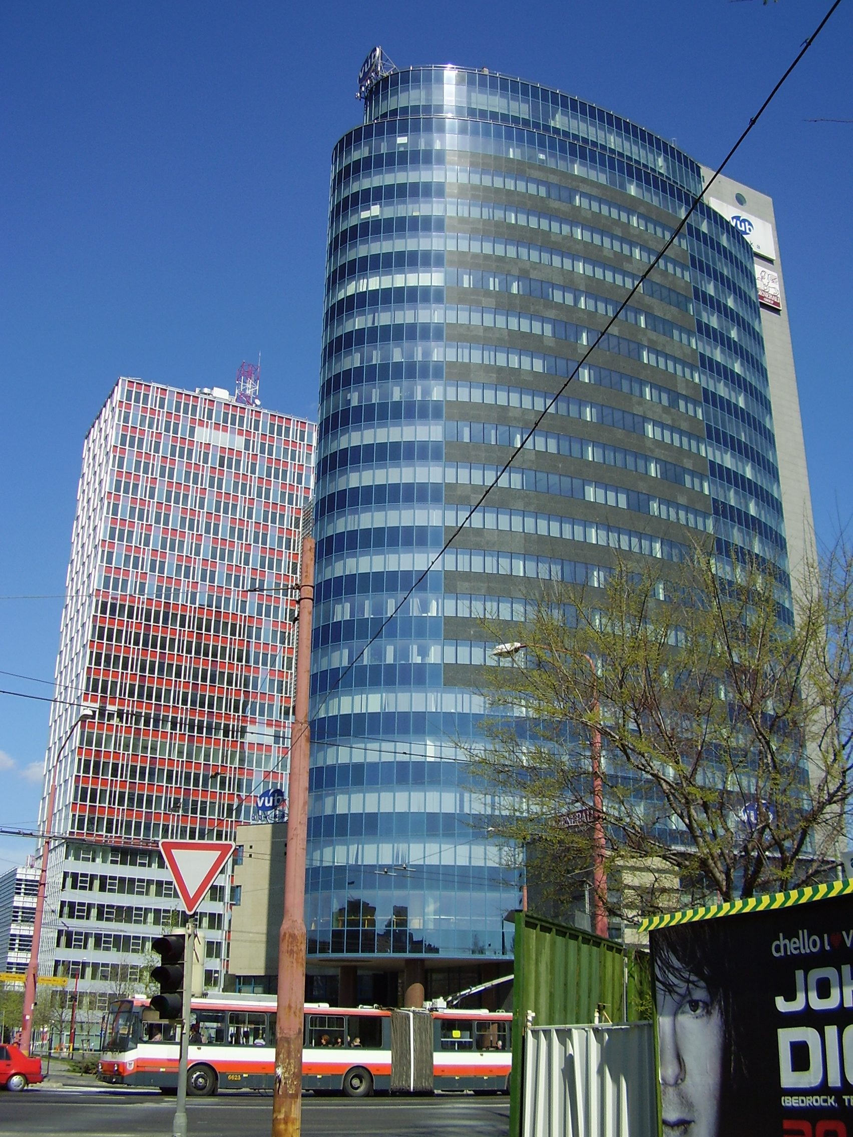 Bratislava